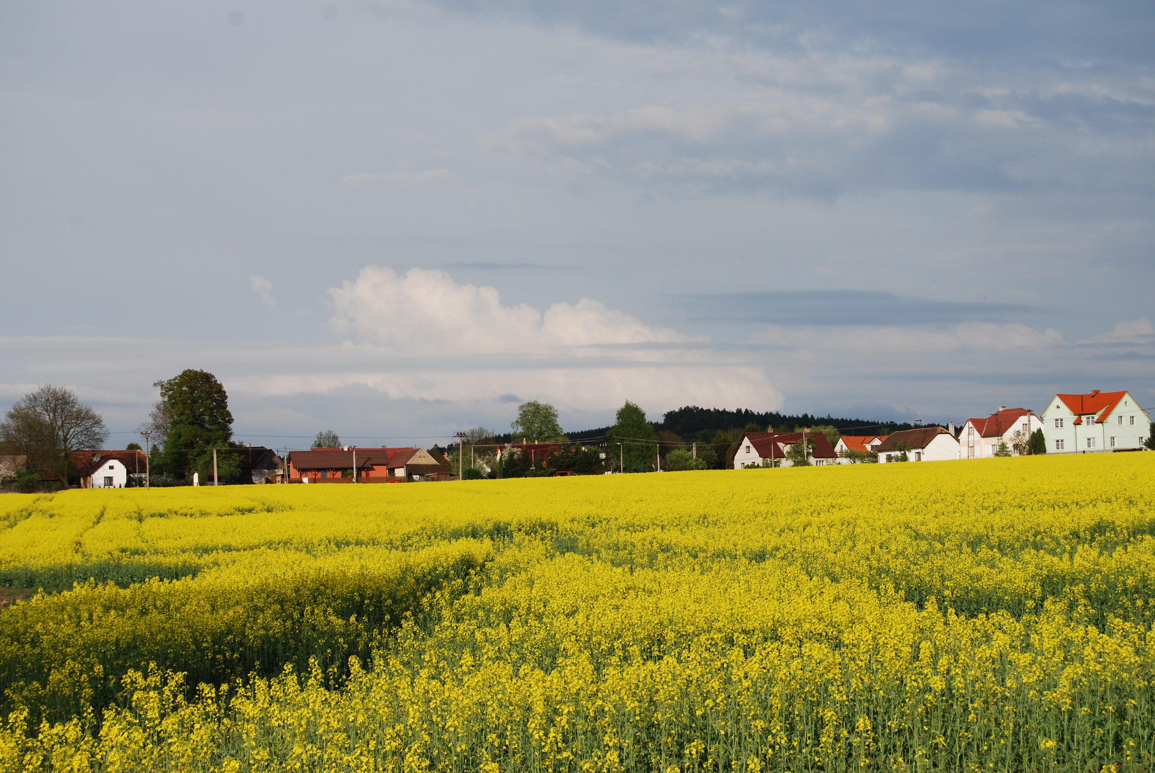 Pohled na část obce Jetětice, na Jetětické Samoty. Okres Písek. Česká republika.